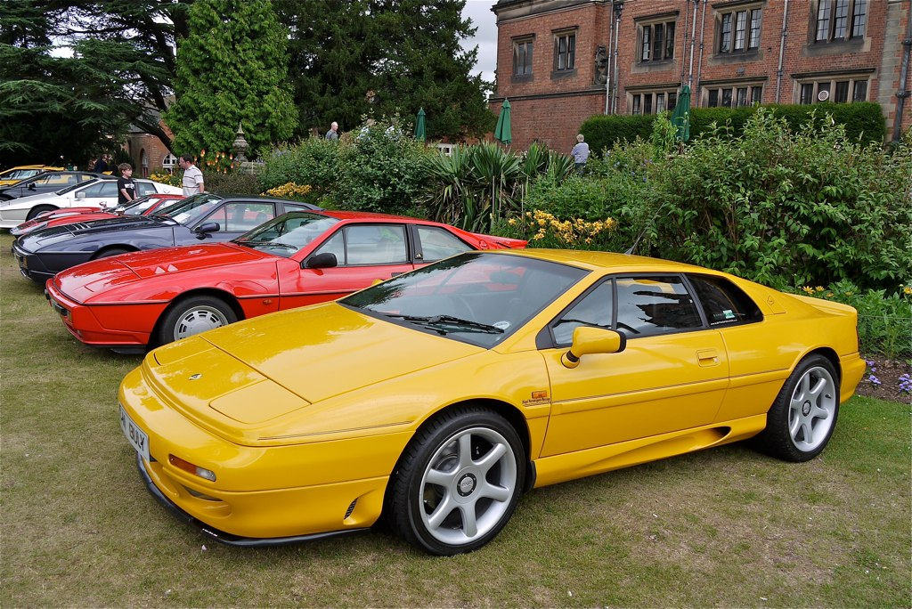 1998 Lotus Esprit GT3 (1974cc)